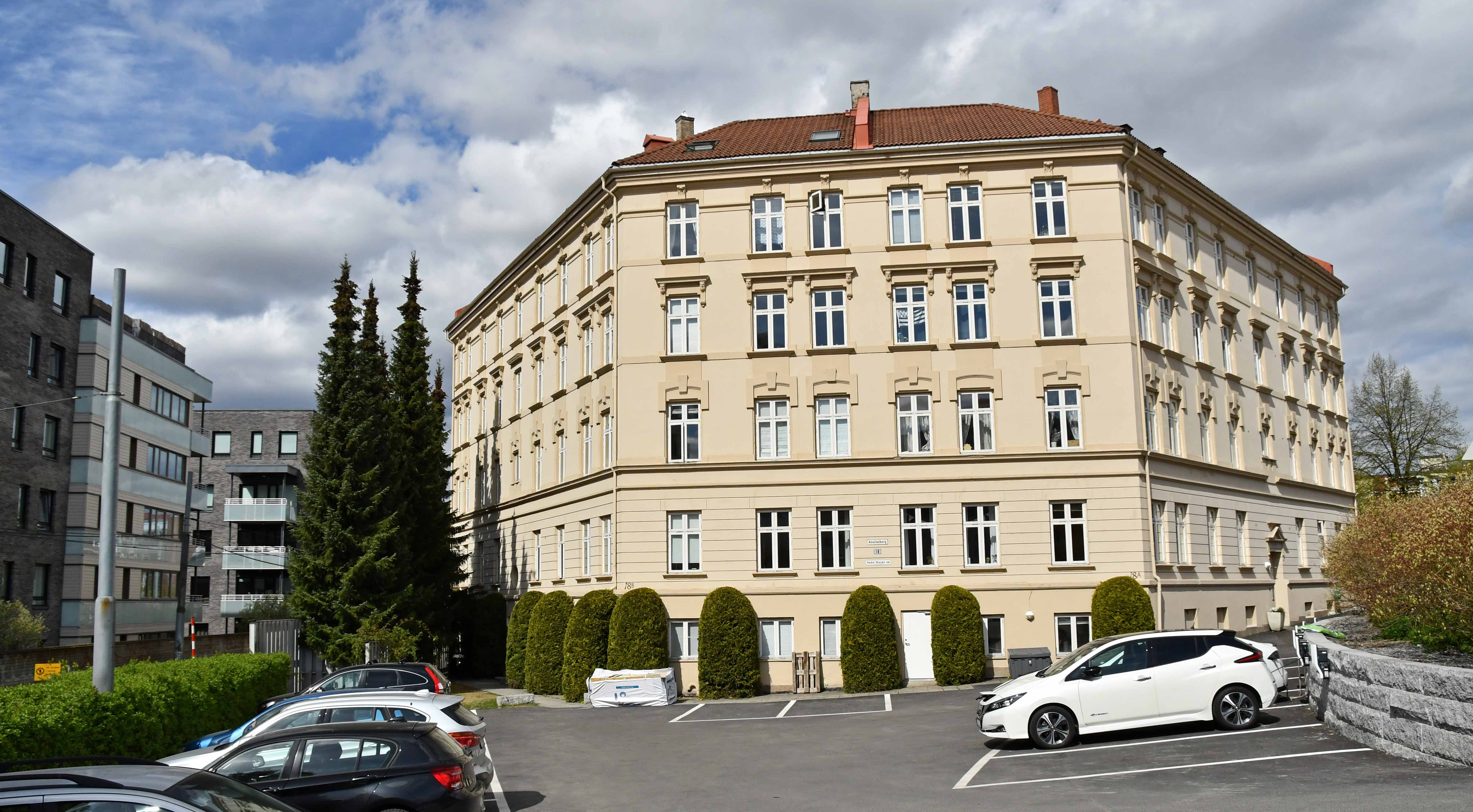 Leiegården Amalienborg, bygget 1900, arkitekt Syver Nielsen, Nedre Skøyen vei 18